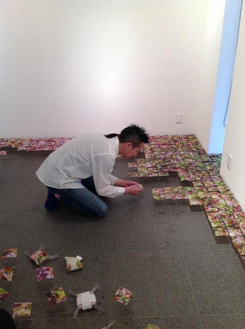 宇都宮市GALLERY IN THE BLUEで開催された加藤良次個展。セッティング風景。